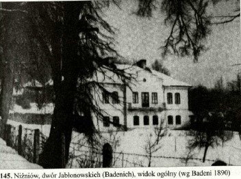 Палац кн. Яблоновських, Нижнів